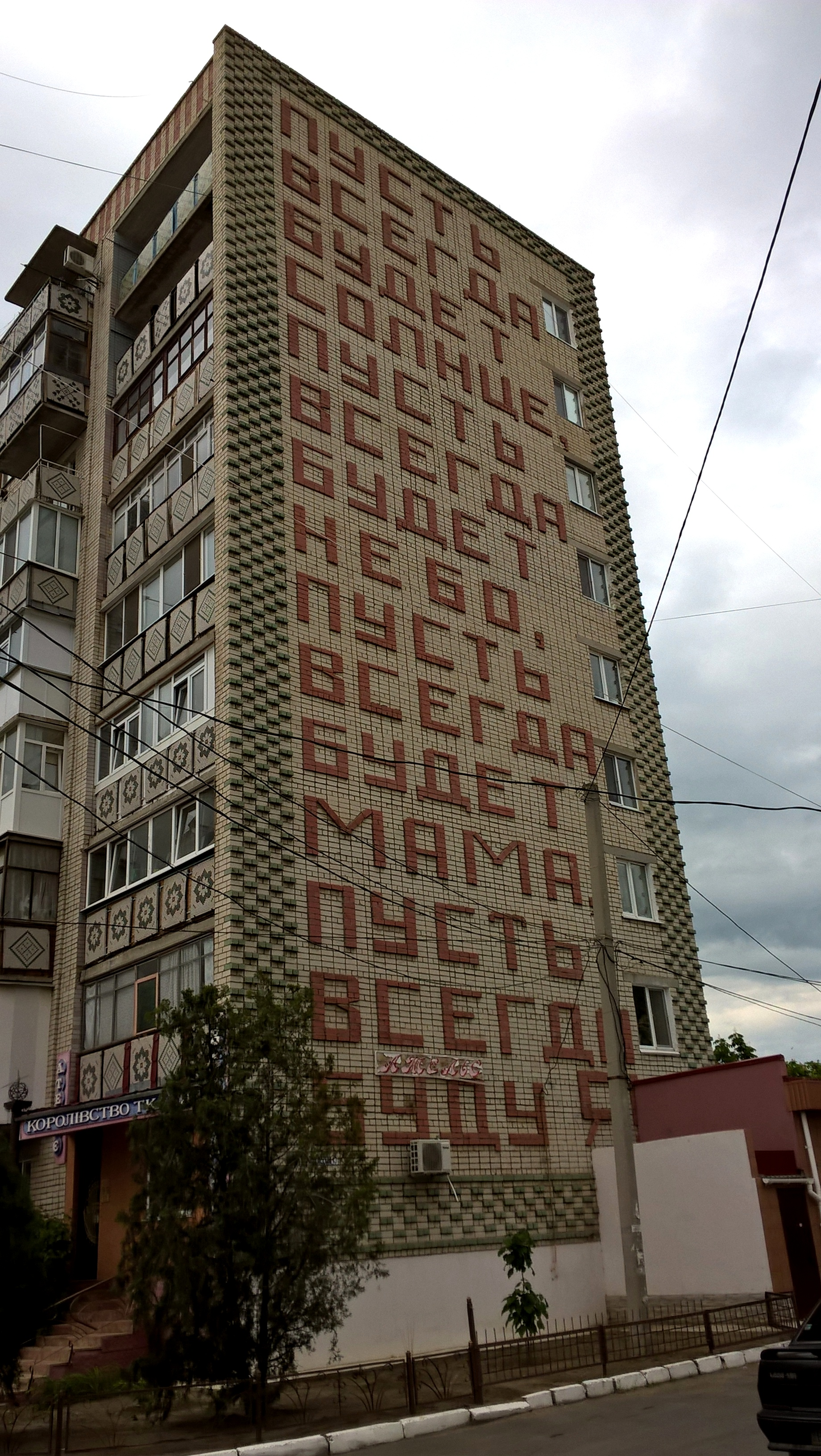 Дев'ятиповерхівка з написом